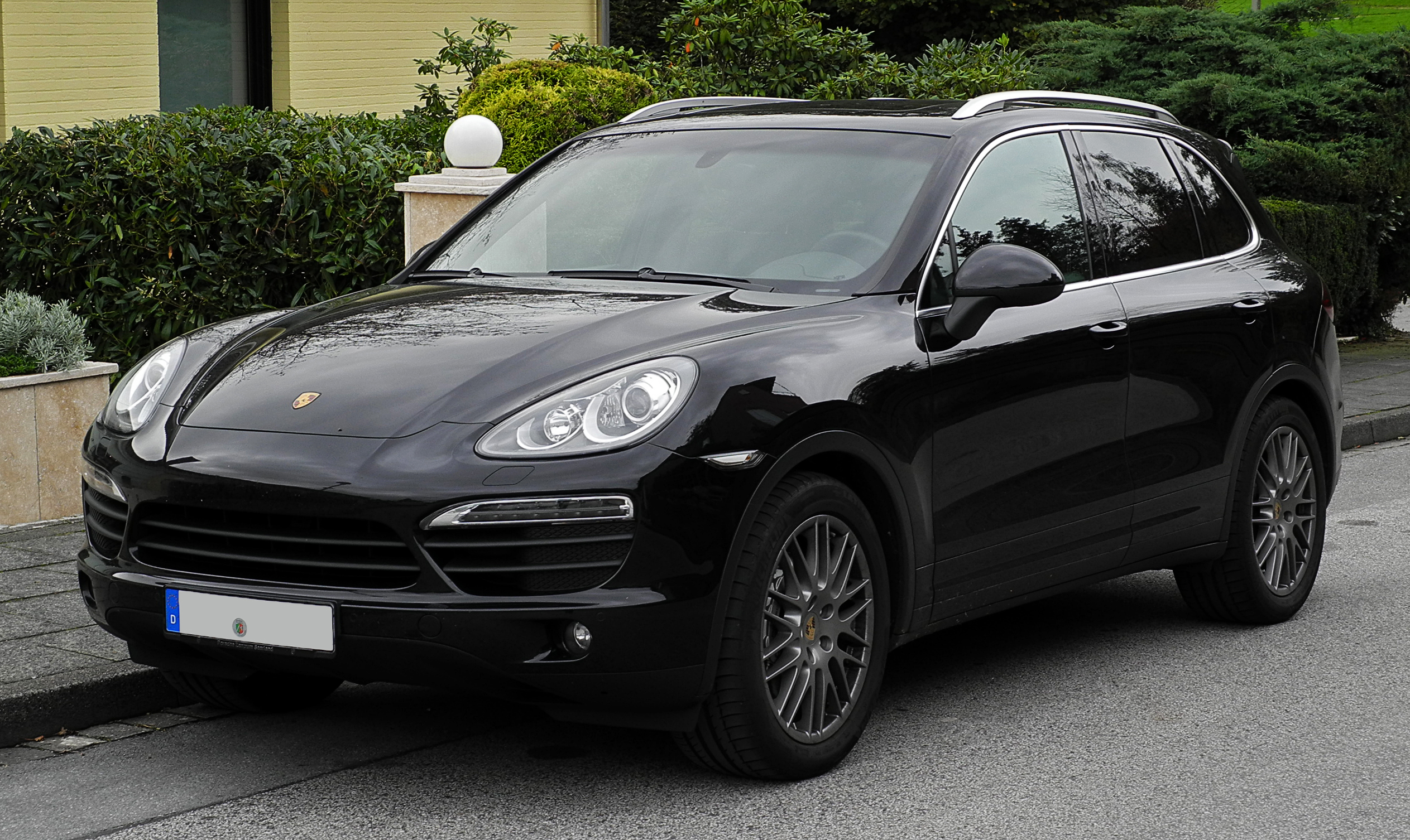 Porsche Cayenne S (92A)